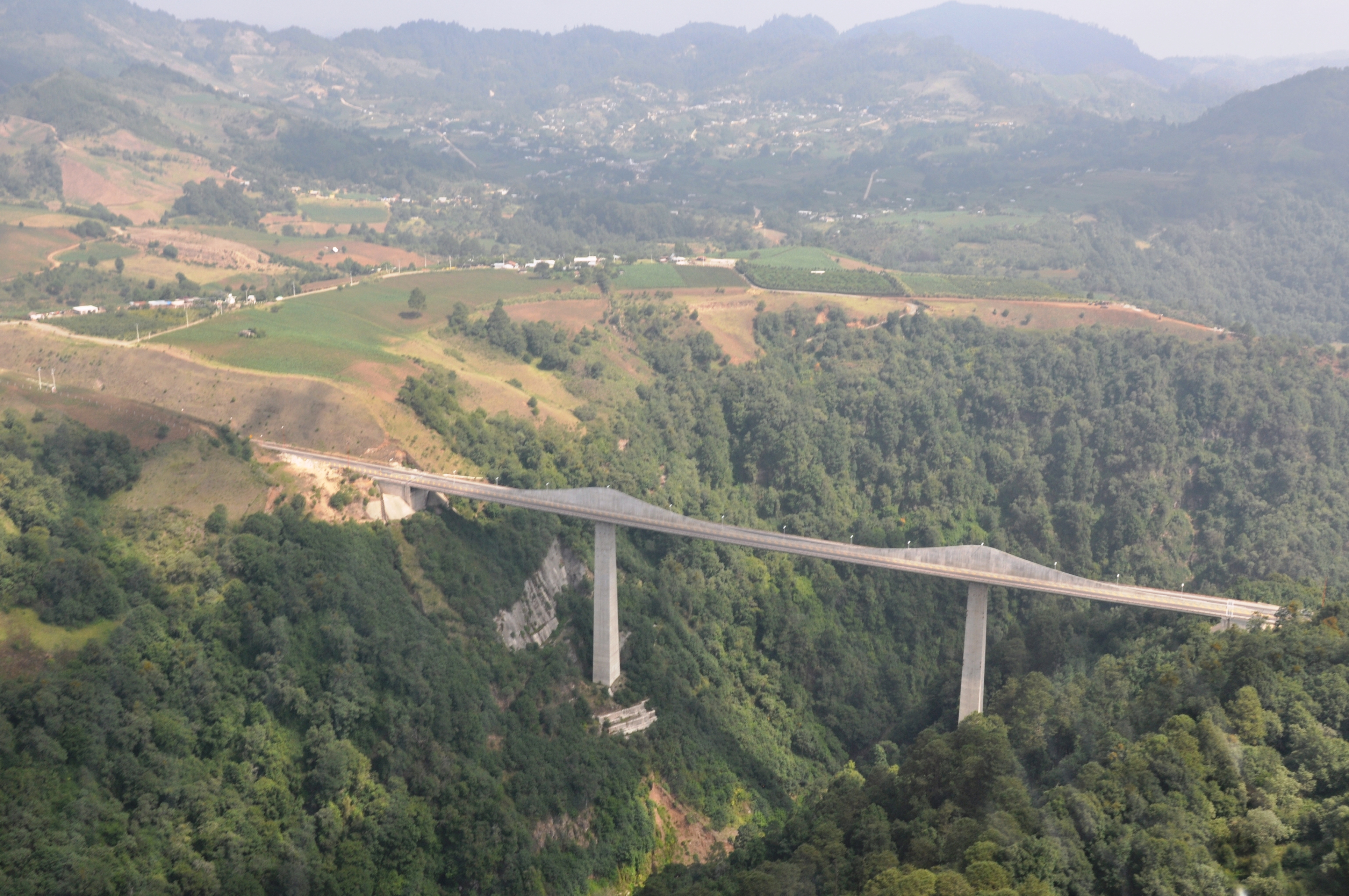 Puente Texcapa